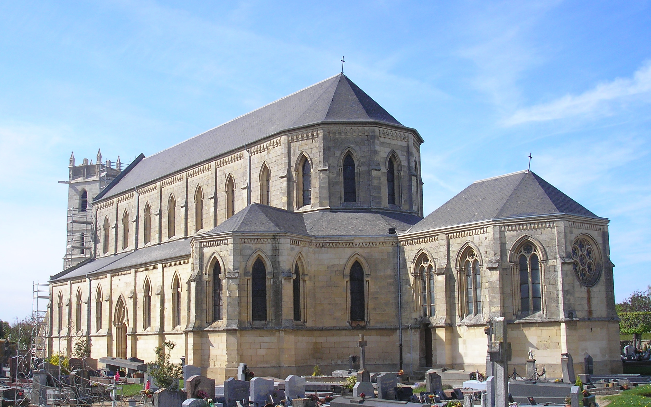 Ranville (Normandie, France). L'église Notre-Dame.